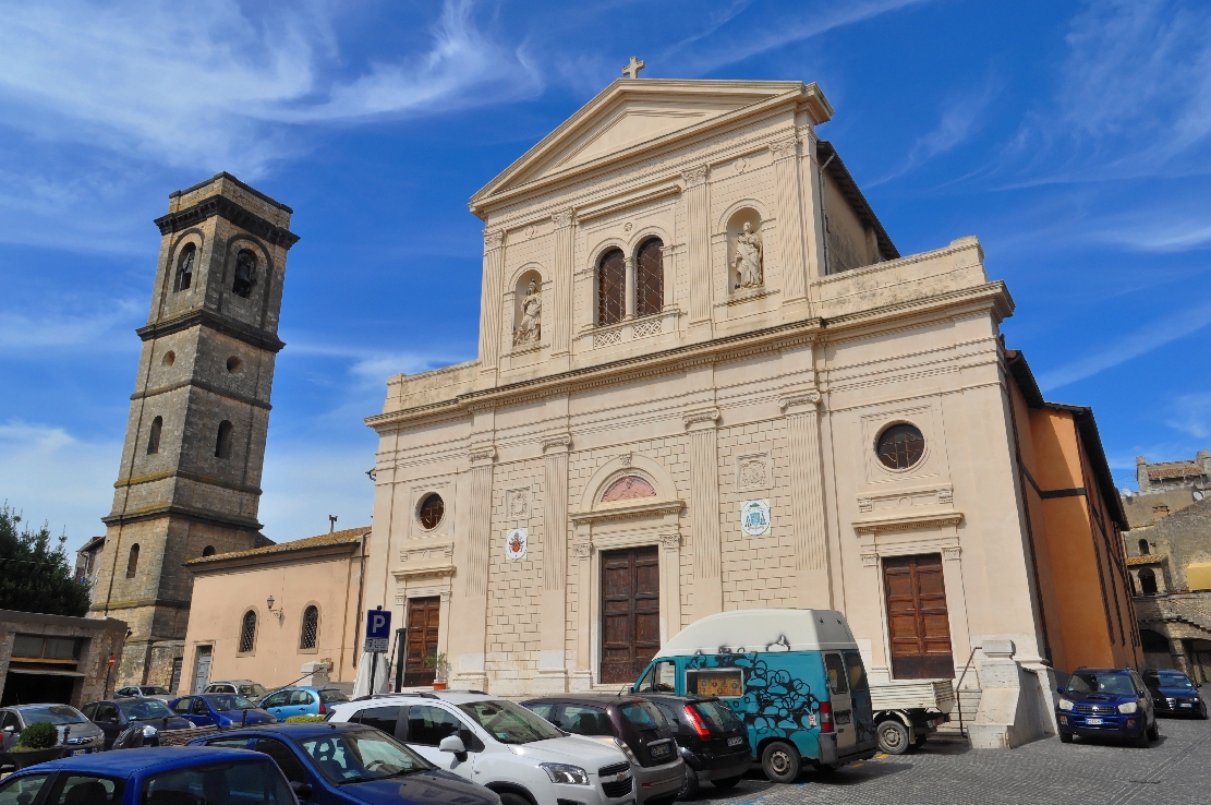 Tarquinia 2014